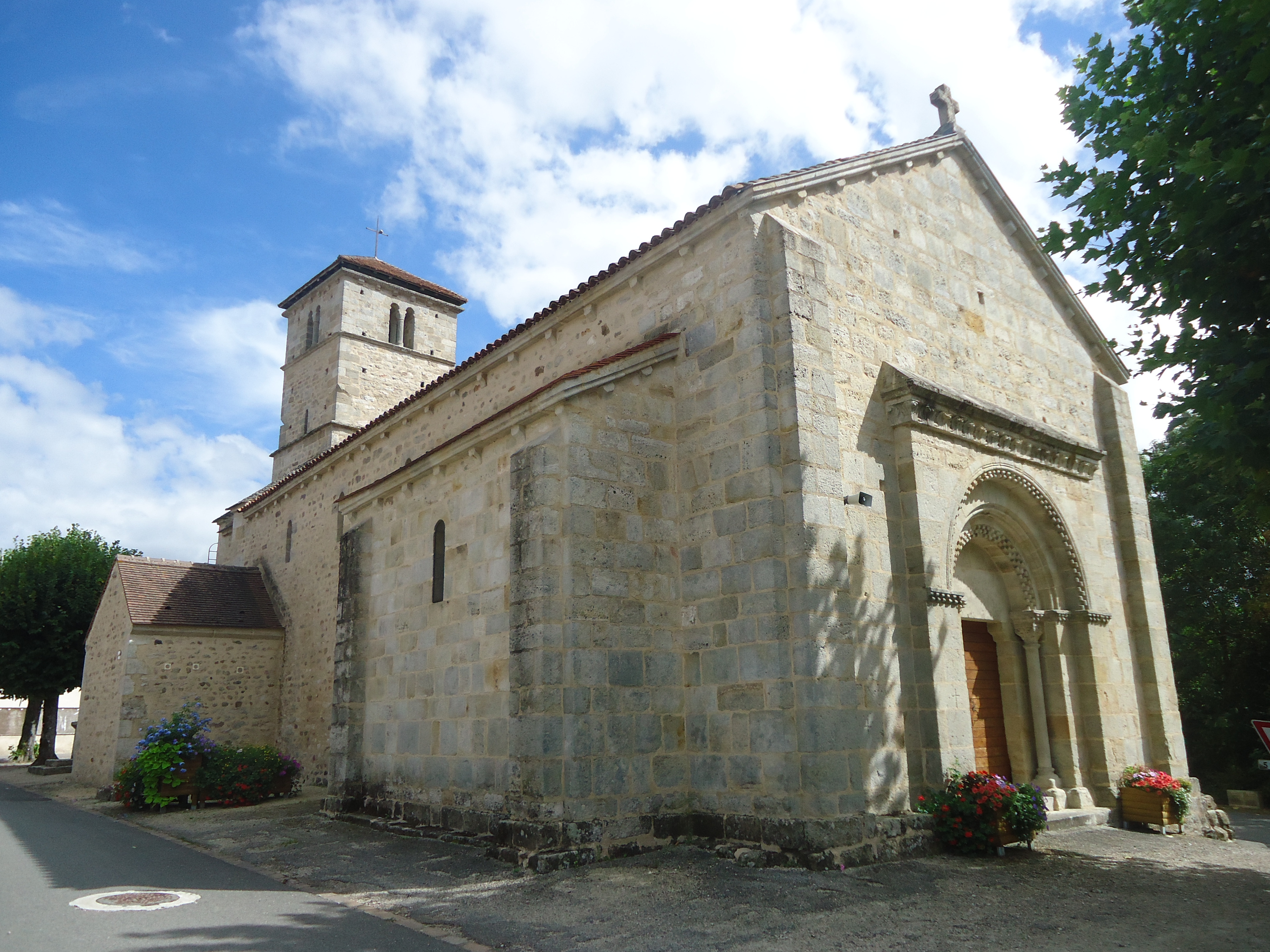 Vue nord-ouest de l'église Saint-Romain